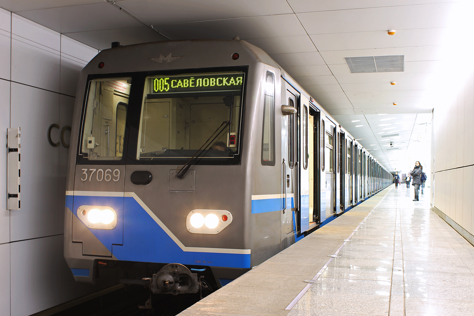 Дата съёмки 17.02.2019